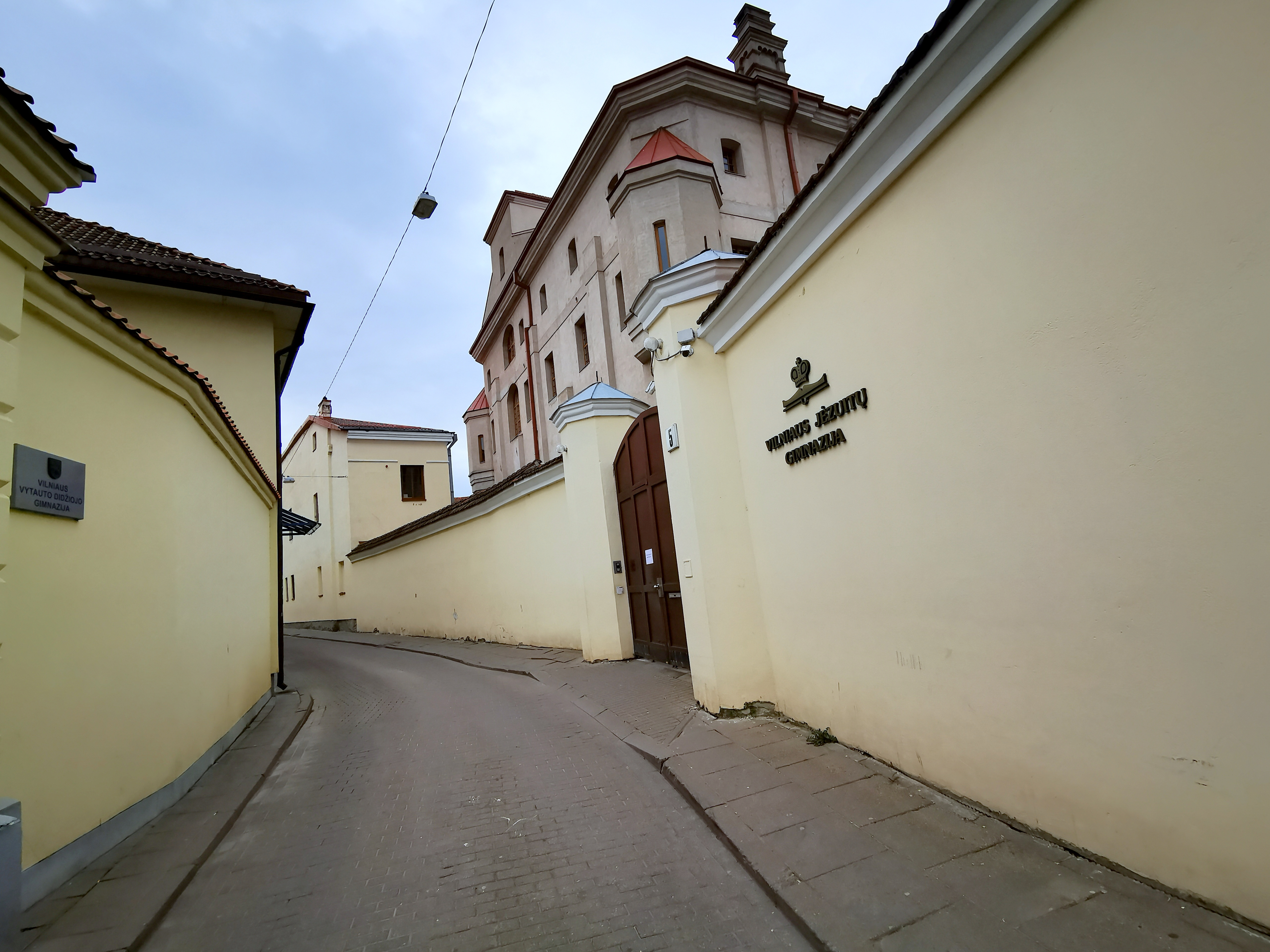 Augustijonų gatvė